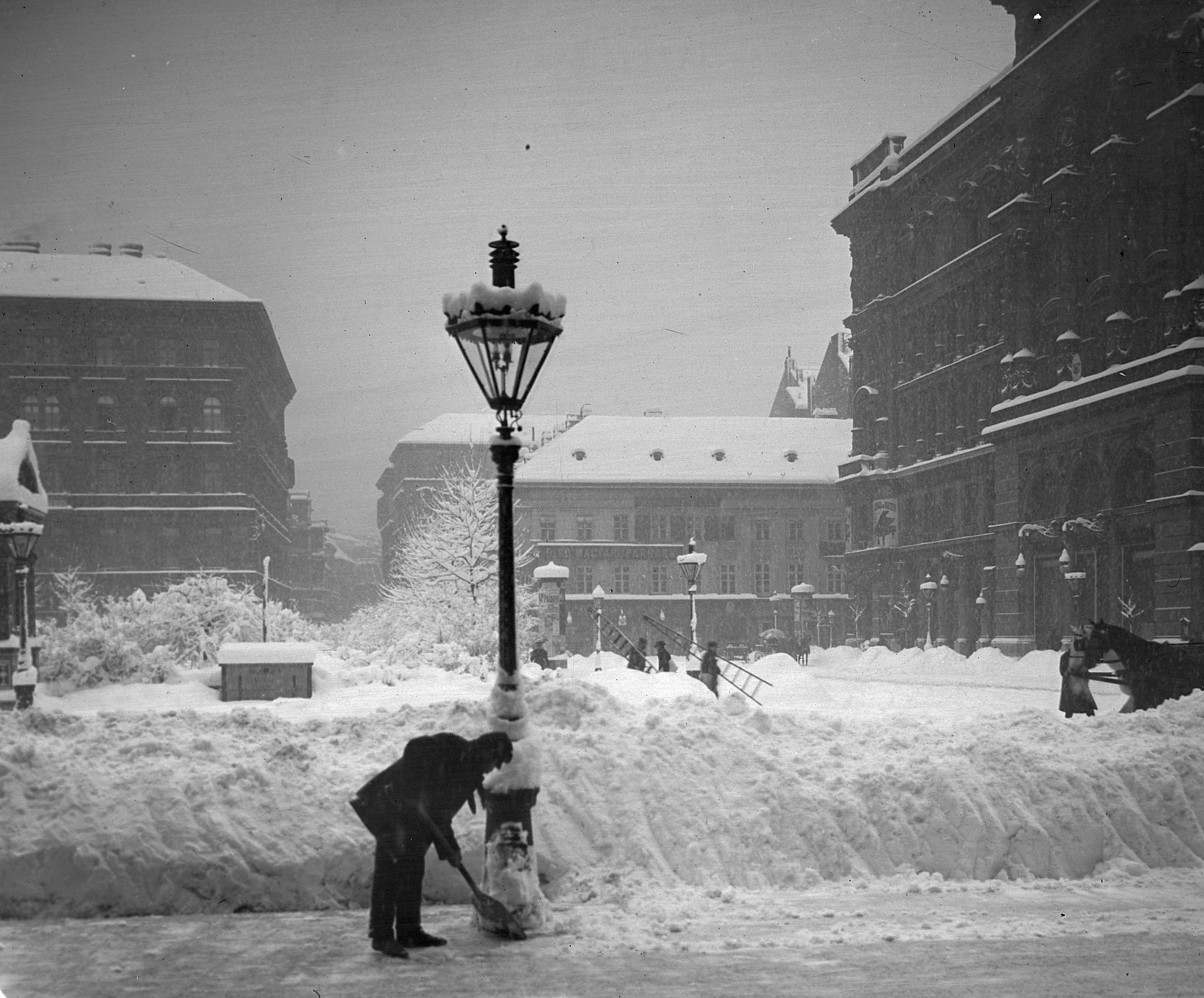 Vörösmarty (Gizella) tér, jobbra a Haas palota, szemben a Váci utca torkolata. Location: Hungary, Budapest V. Tags: winter, Budapest Title: Vörösmarty (Gizella) tér, jobbra a Haas palota, szemben a Váci utca torkolata.